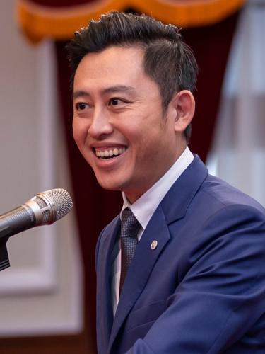 新竹市市長林智堅出席總統接見「2020國家卓越建設獎暨全球卓越建設獎」得獎代表活動